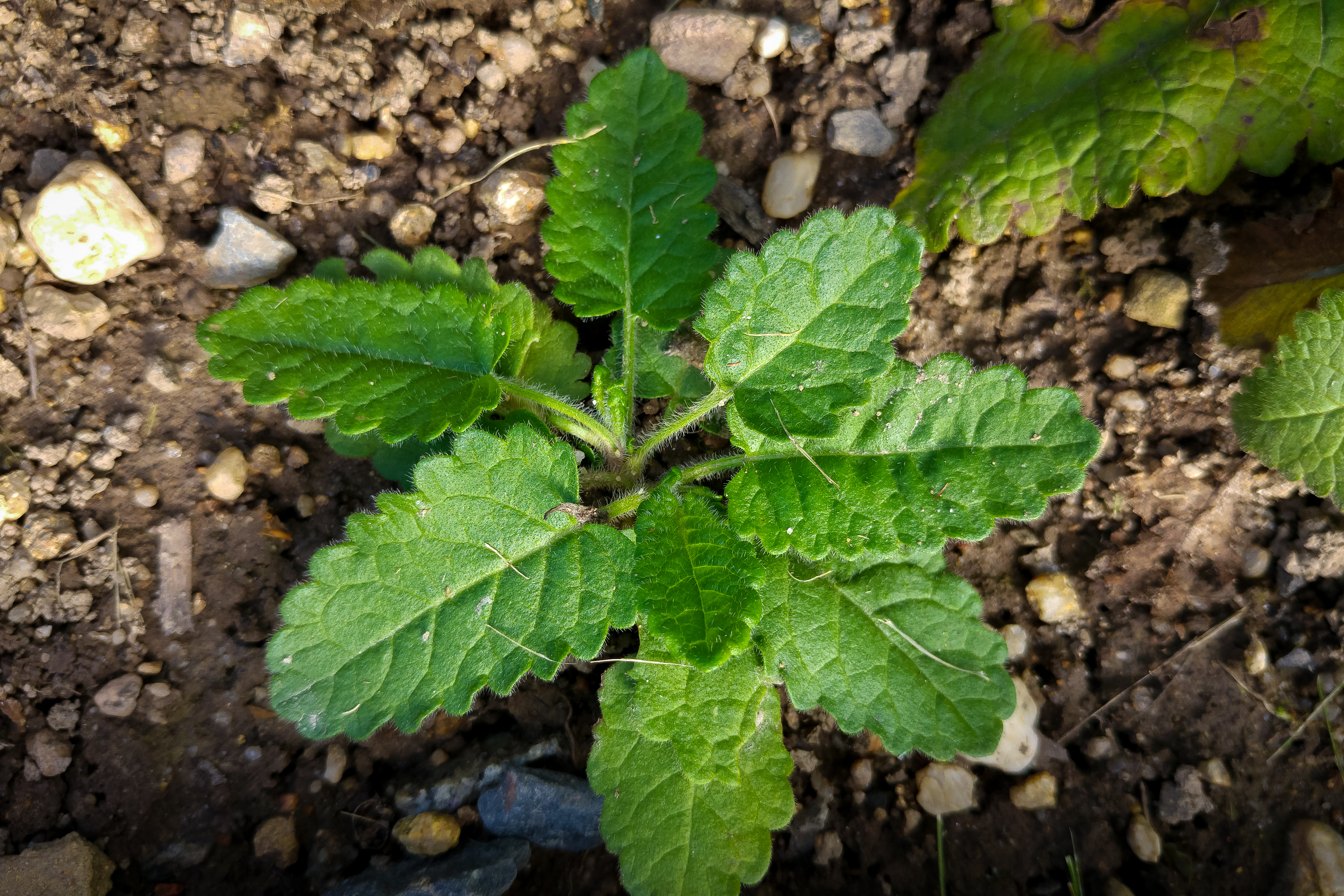 Der Heilziest, die Echte Betonie, lat.: Betonica officinalis oder Stachys betonica